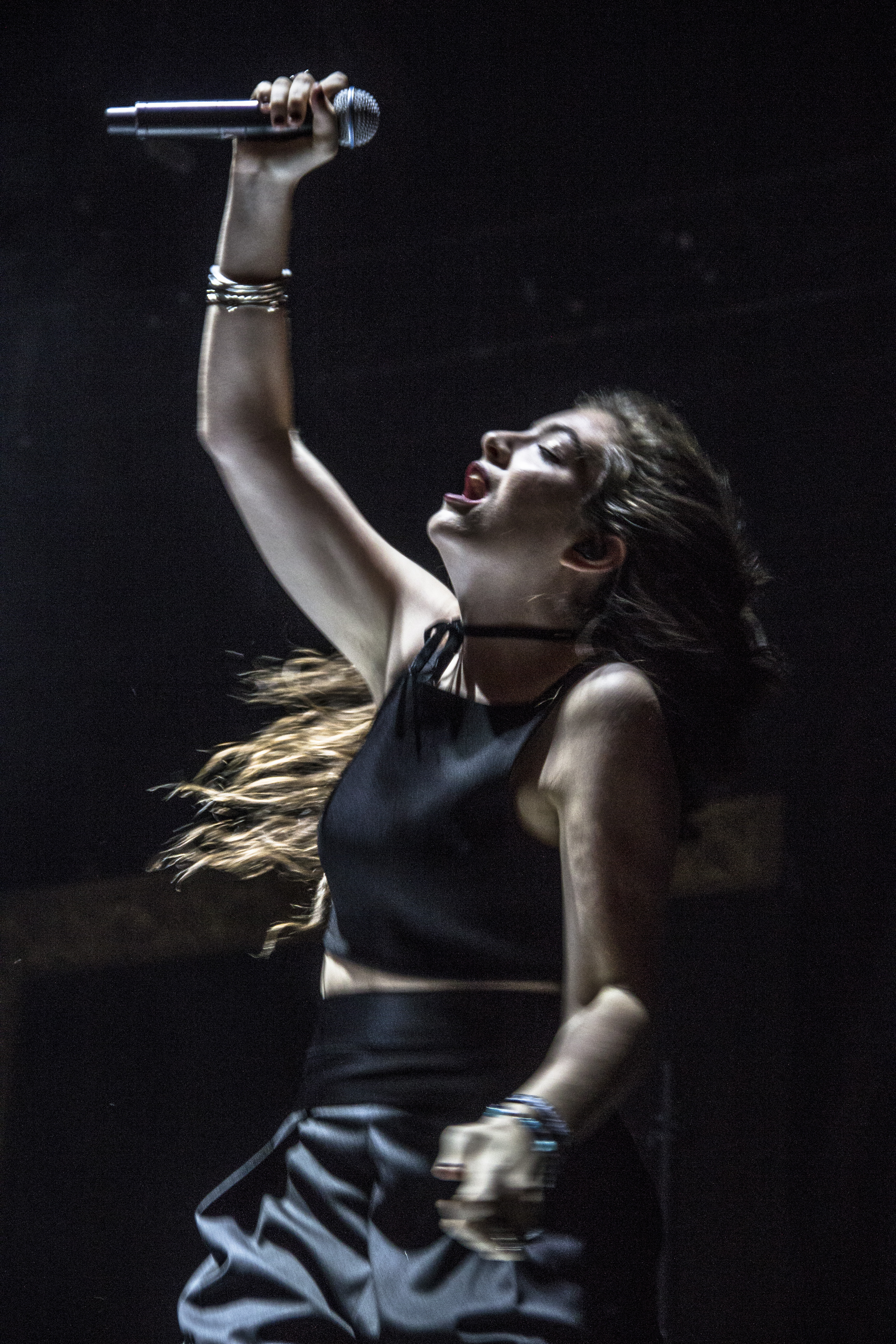 weeklydig